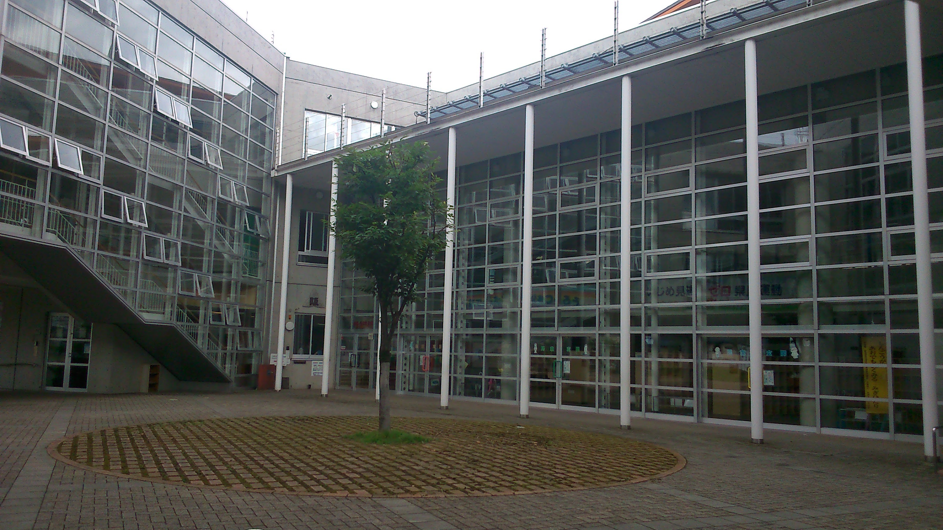 新潟県 長岡市にて撮影。